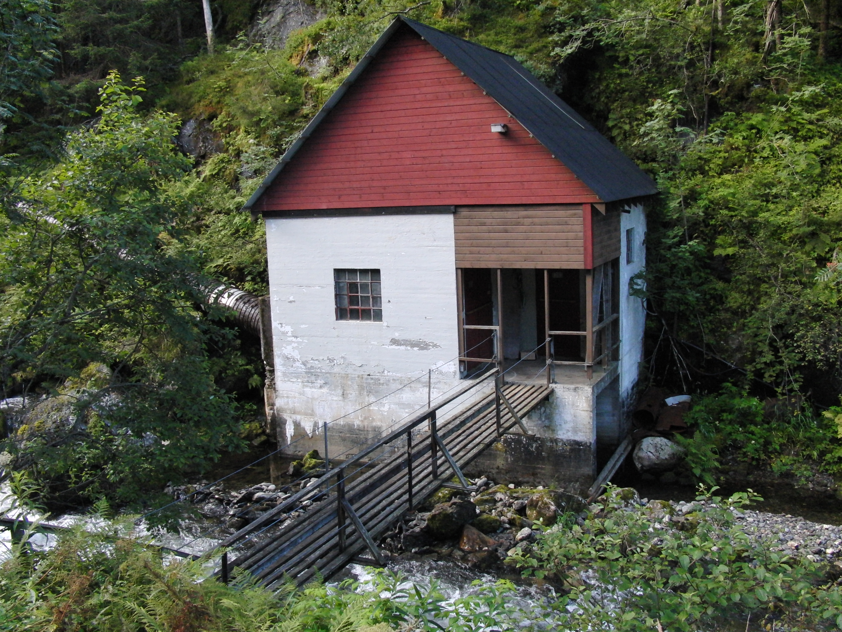 Vinjadalen kraftverk